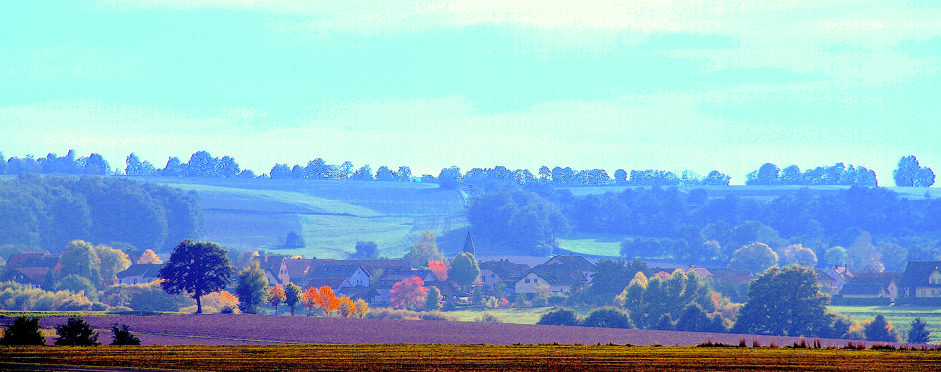 Schweben unterhalb des Eisenküppels (rechts des Kirchturms) und des Schwebener Bergs (links des Kirchturms)